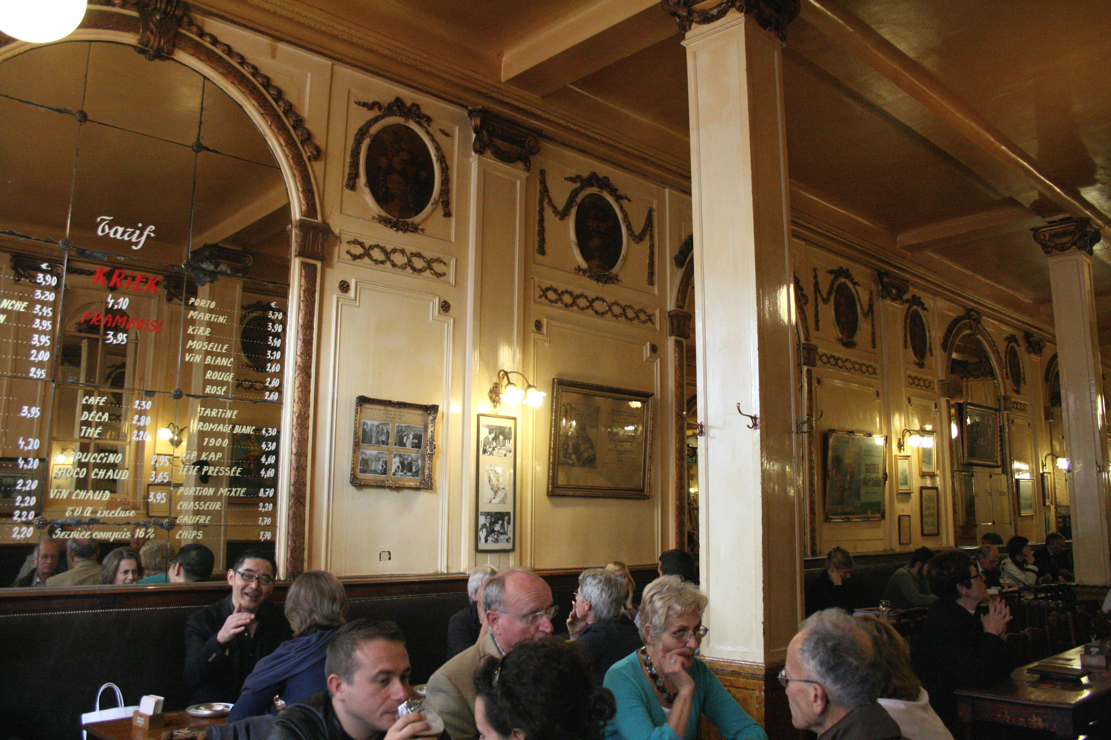 Rue Montagne-aux-Herbes-Potagères 7, Bruxelles, Belgique. Café "À la Mort Subite"